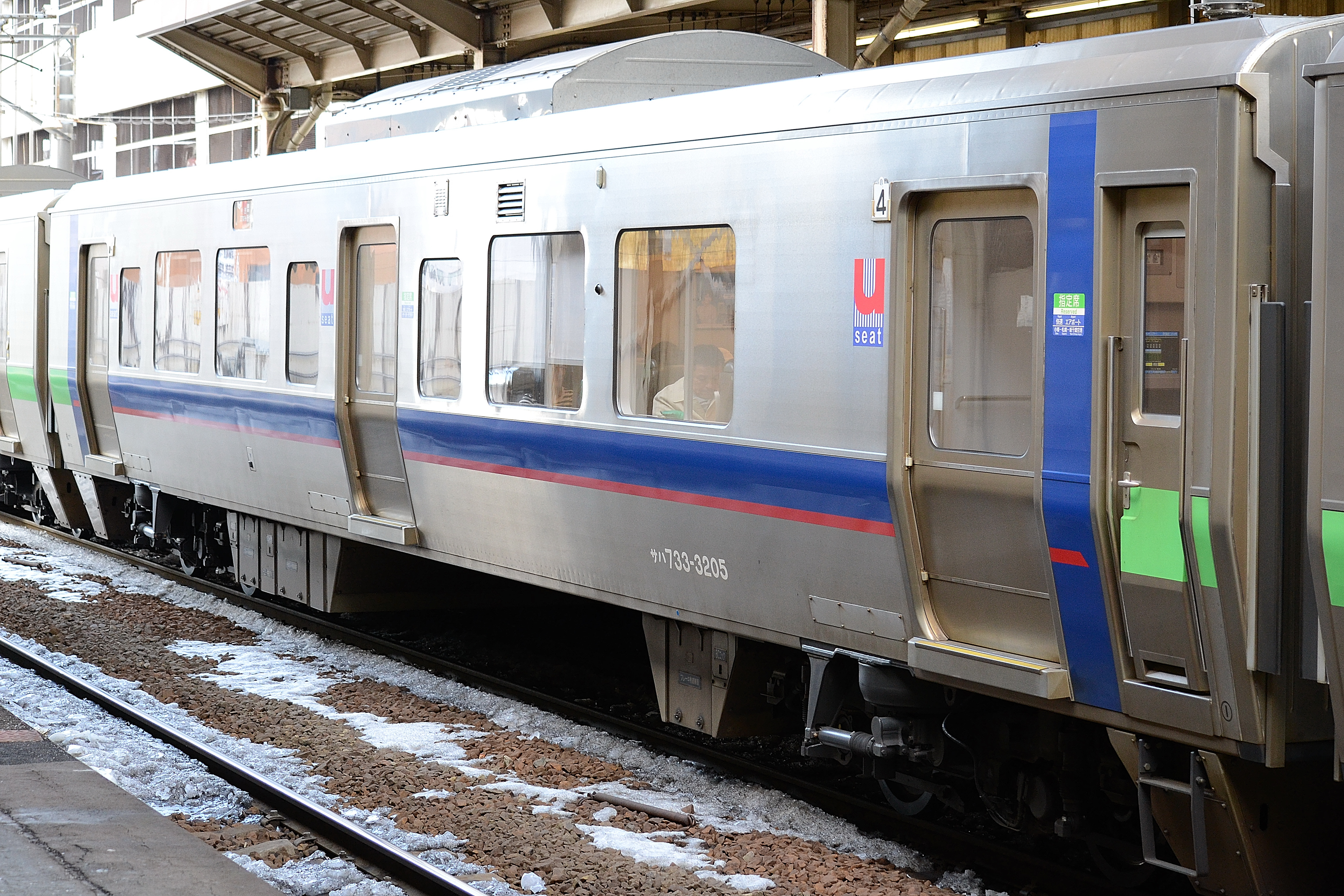 Uシート車のサハ733-3000番台